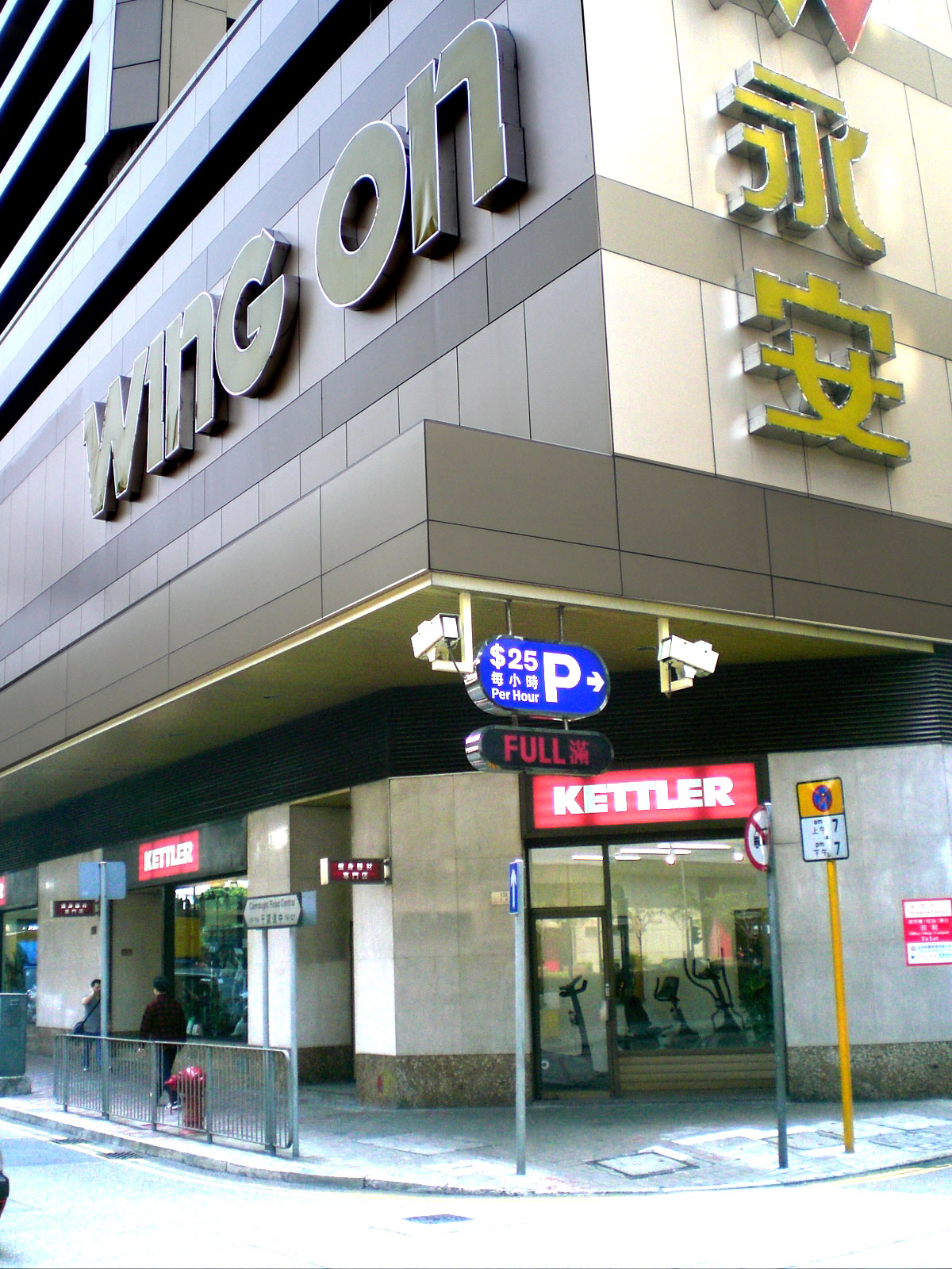 上環干諾道中永安中心KETTLER 克特勒專門店